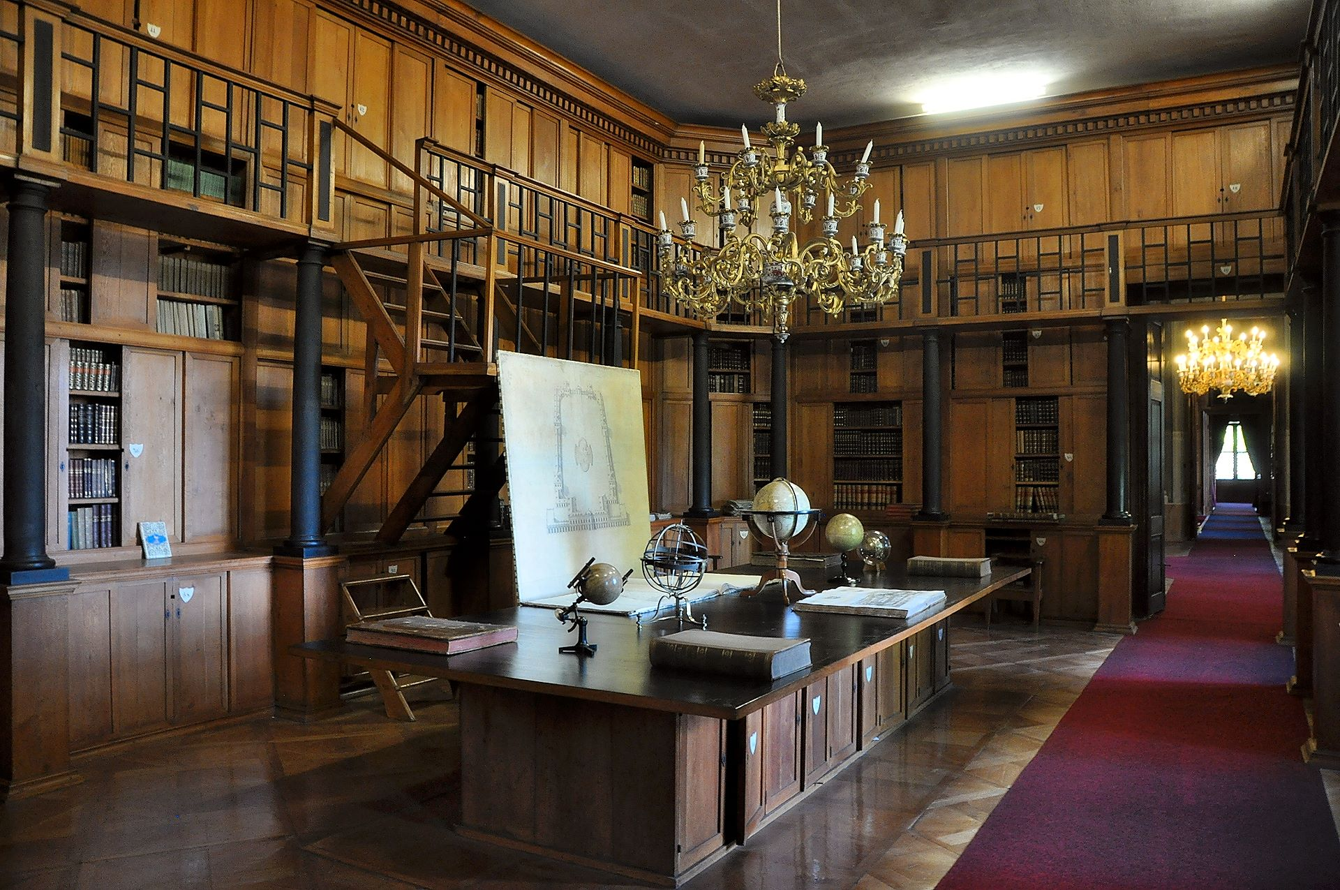 Schloss Rajec nad Svitavou